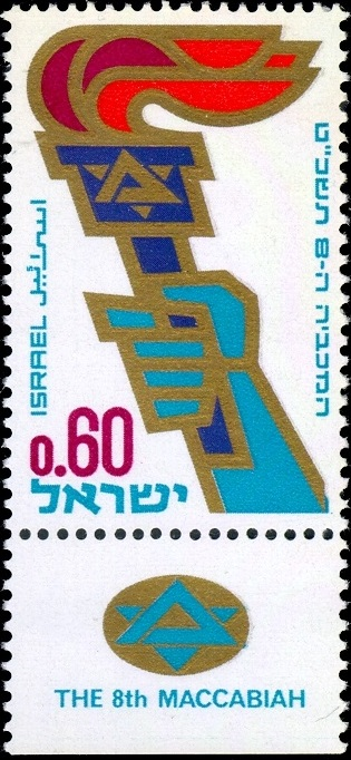 בול המכביה השמינית